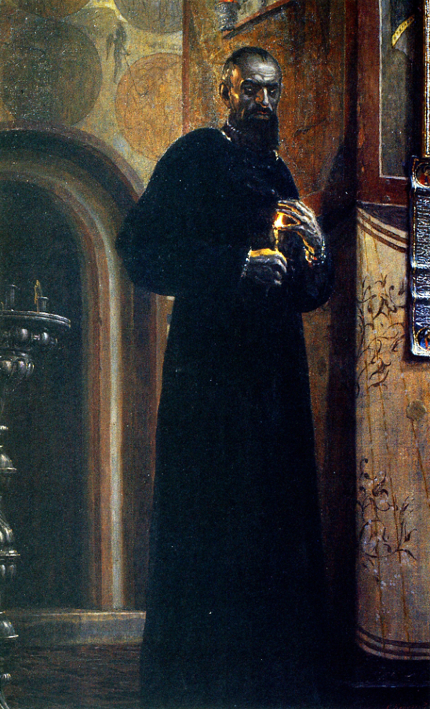 Сергей Кириллов. «Иван Грозный». 1988 - 1990. Х.м. 116x72